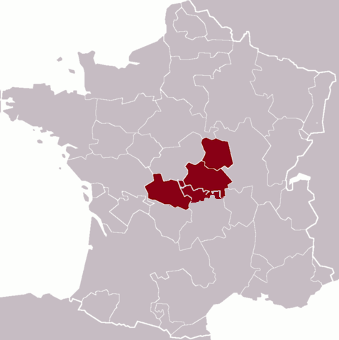 Généralité de Moulins sous l'ancien régime